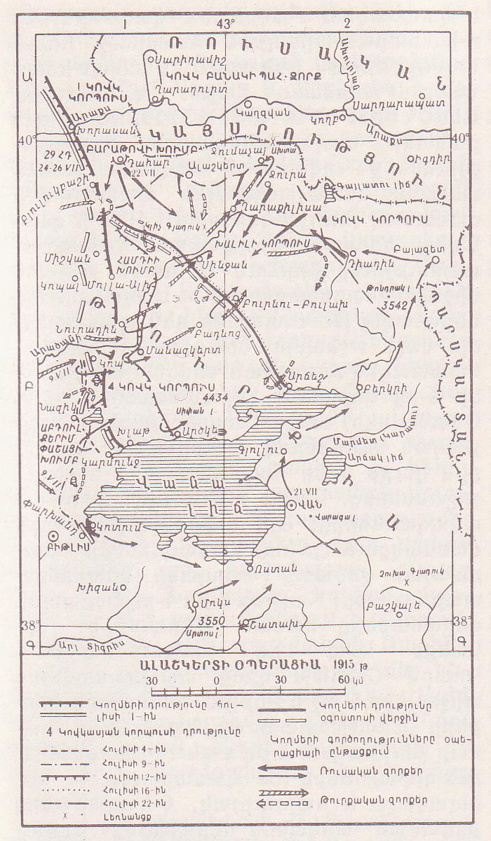 Ալաշկերտի Օպերացիա 1915